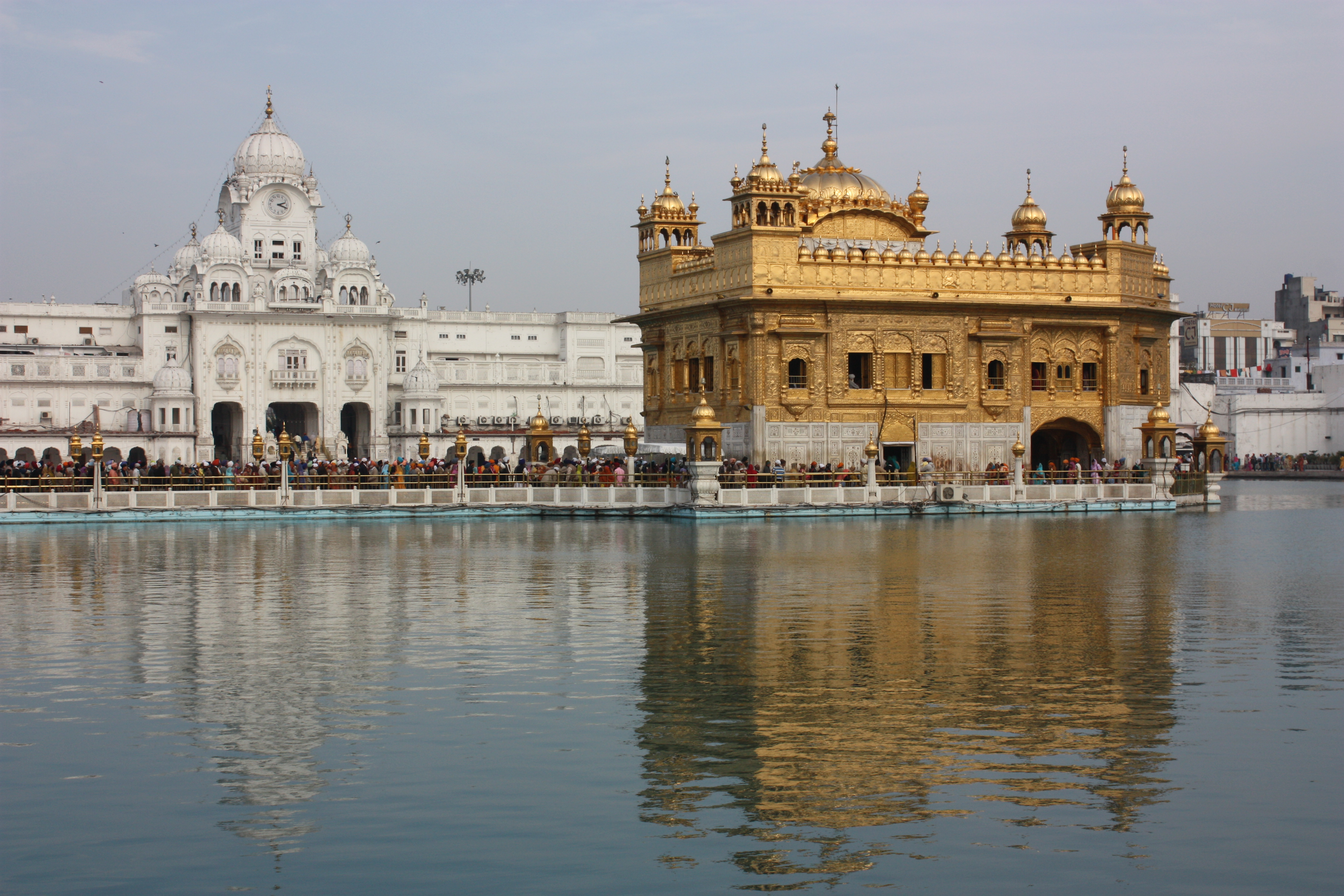 Amritsar, Golden Temple